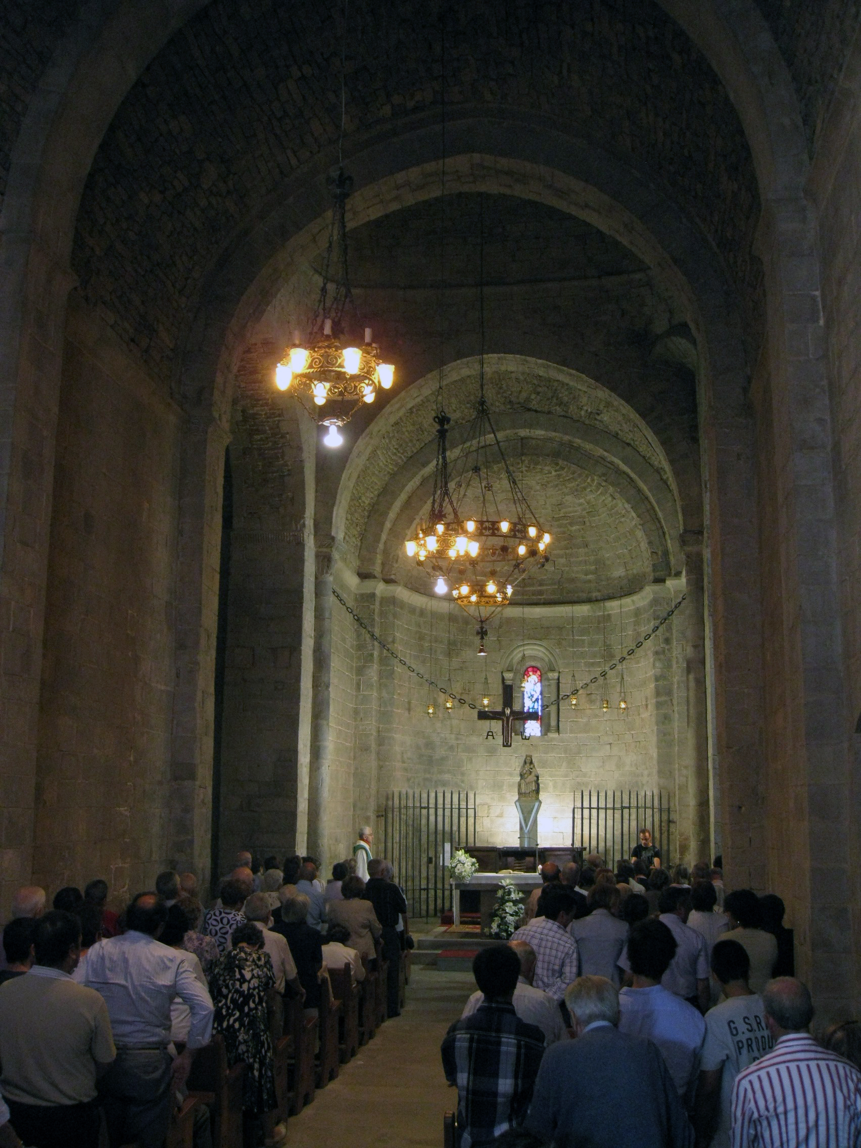 Santa Maria de l'Estany (Bages), interior de l'església